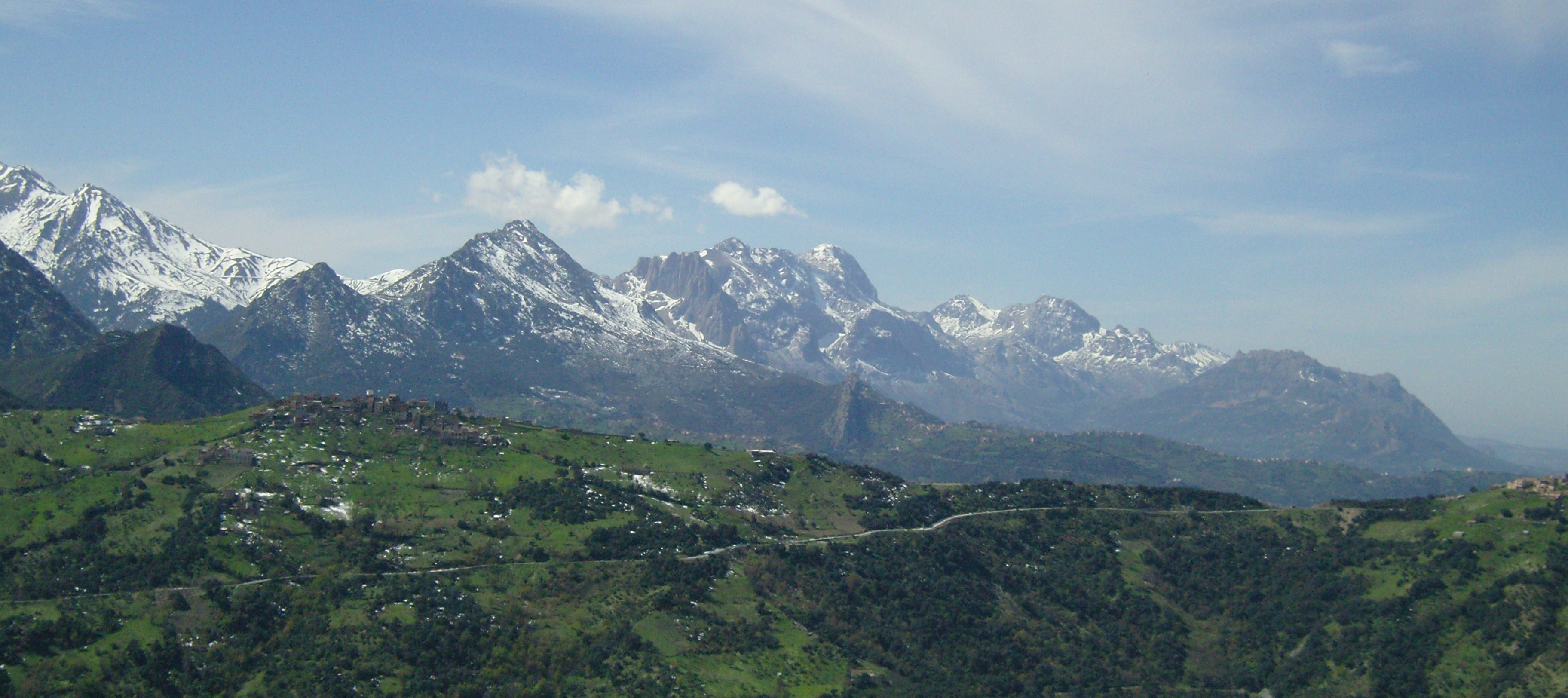 Vue sur le versant nord est de Adrar n Jerjer